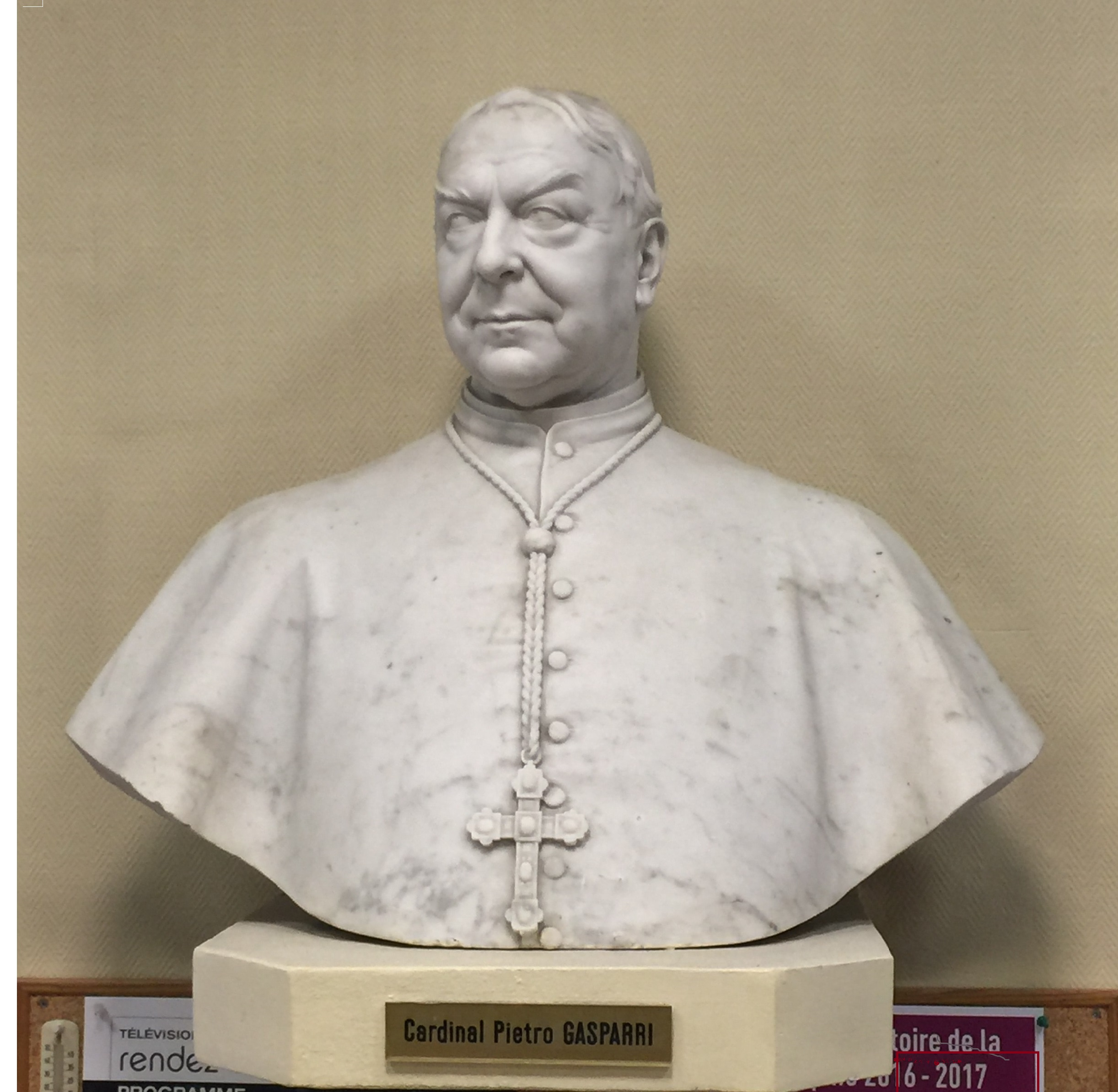 Buste du Cardinal Pietro Gasparri, dans la bibliothèque de la Faculté de Droit canonique